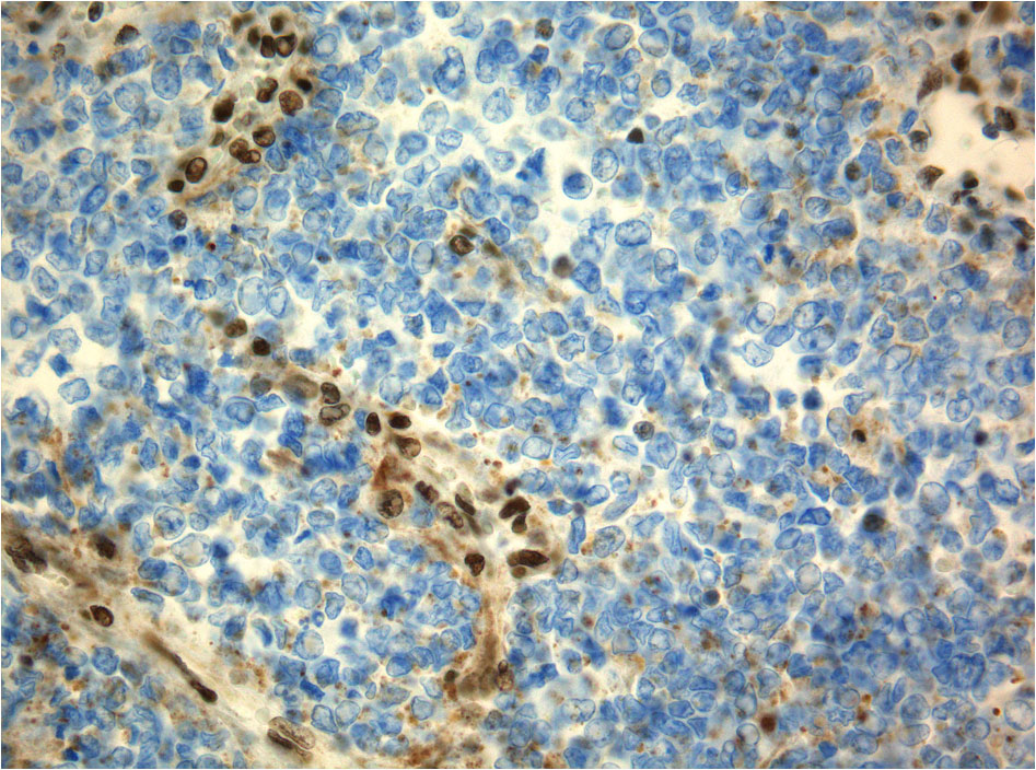 ATRT. Immunhistochemie für das INI1-Protein mit fehlender Anfärbung der Tumorzellkerne bei SMARCB1-Mutation